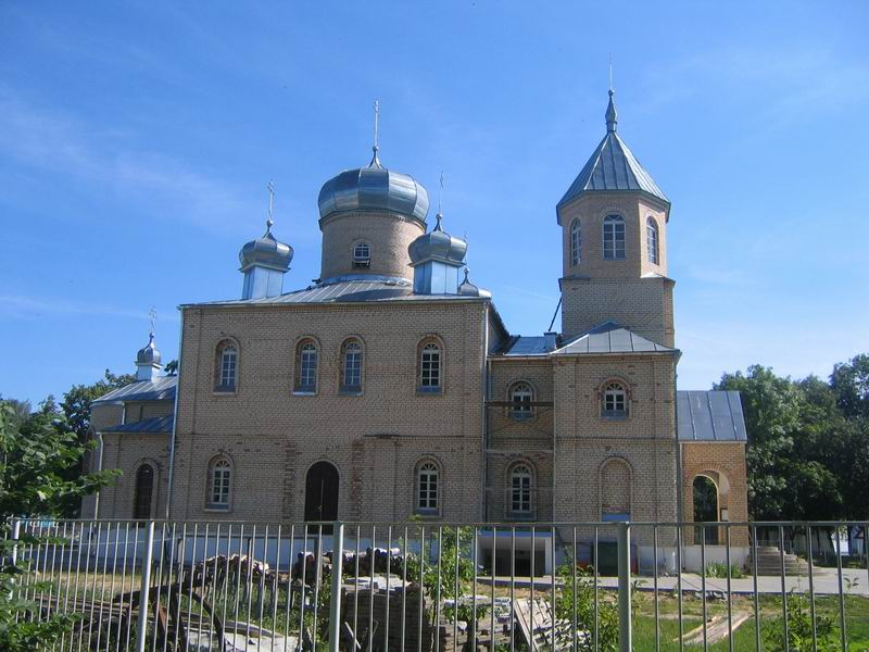 Беларуская (тарашкевіца): Ігумен